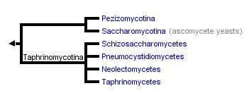 Cladograma mostrando relação filogenética entre grupos de Ascomycotas. Fonte: Lutzoni et.al., 2004,Spatafora et. al., 2006